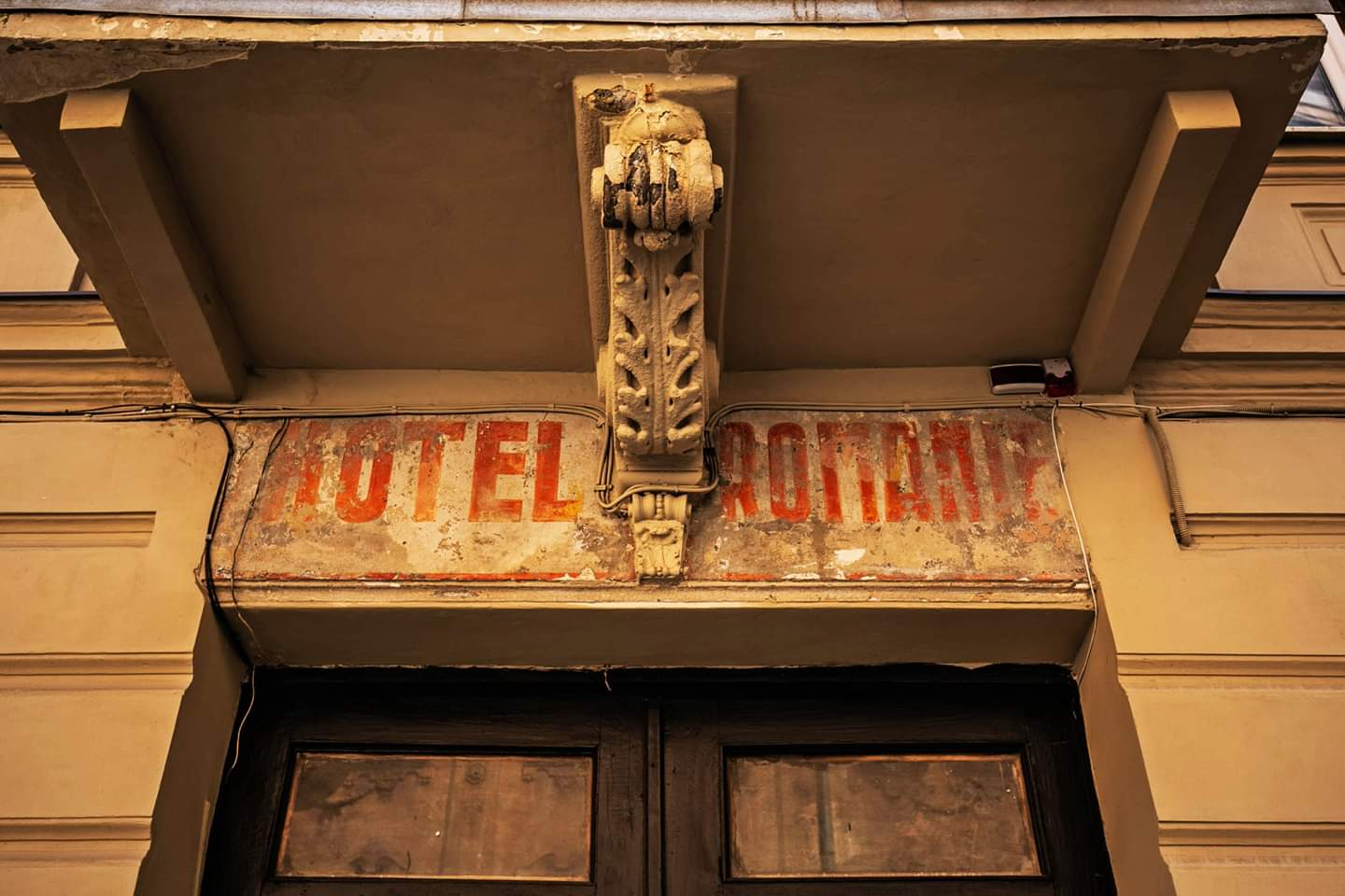 рік невідомий